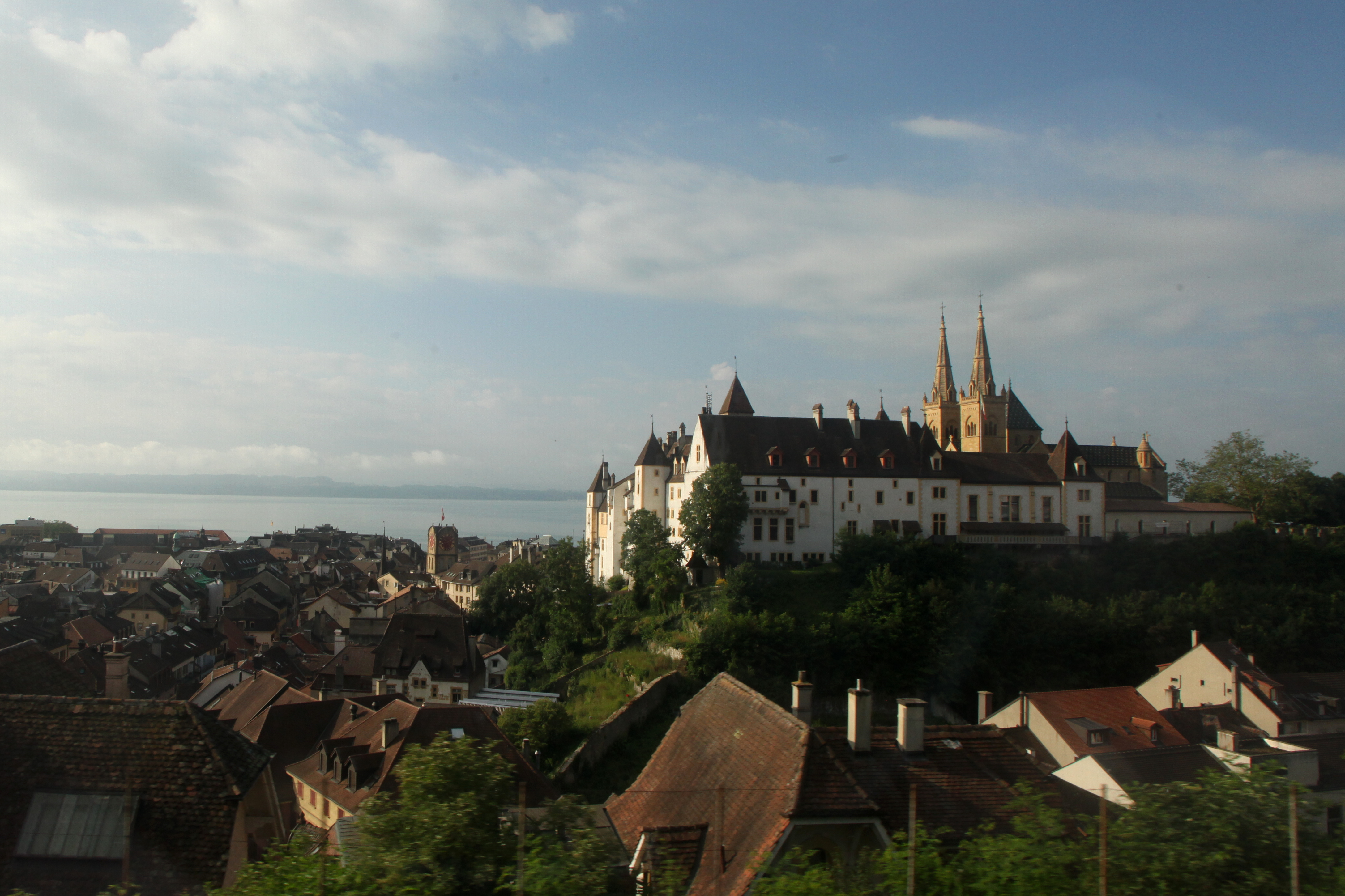 Le château de Neuchatel vu du train.